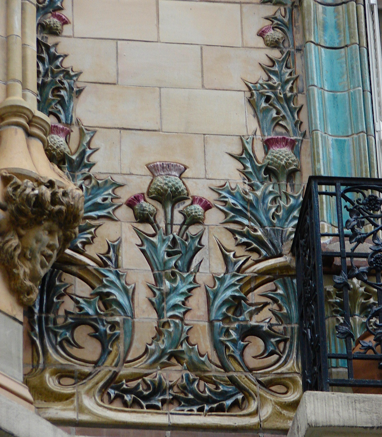 "Les Chardons" Détail du travail de céramique au deuxième étage (Rue C. Chahu)